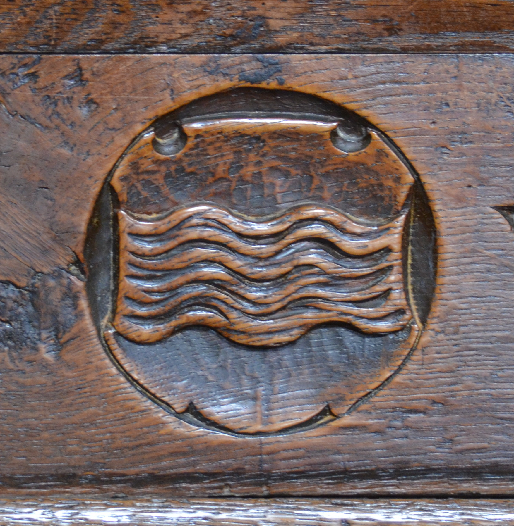 Bern, Münster, Kirchenortschild A. L. Wyttenbach